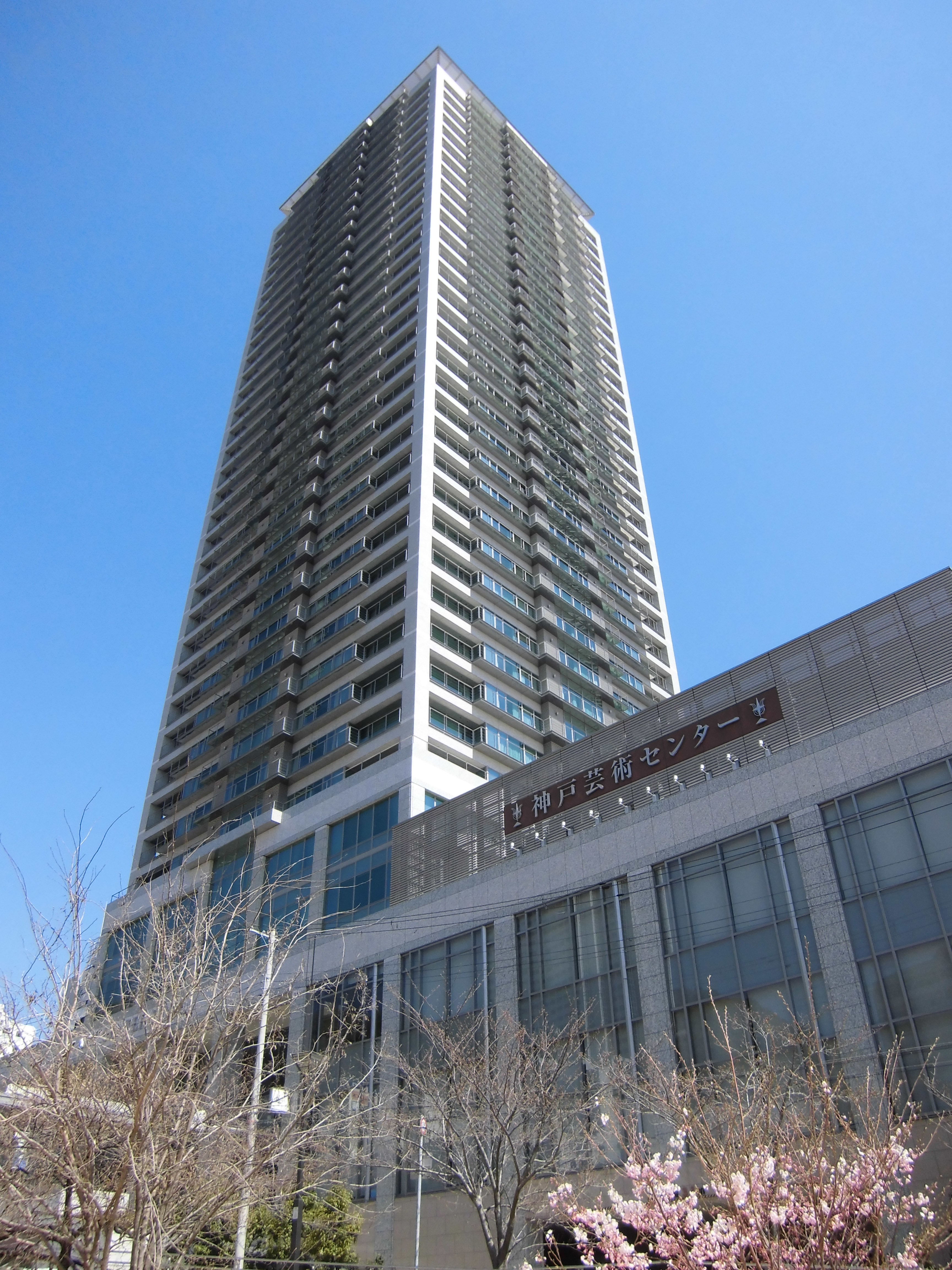 2020-03-25 Art Center of Kobe 神戸芸術センター